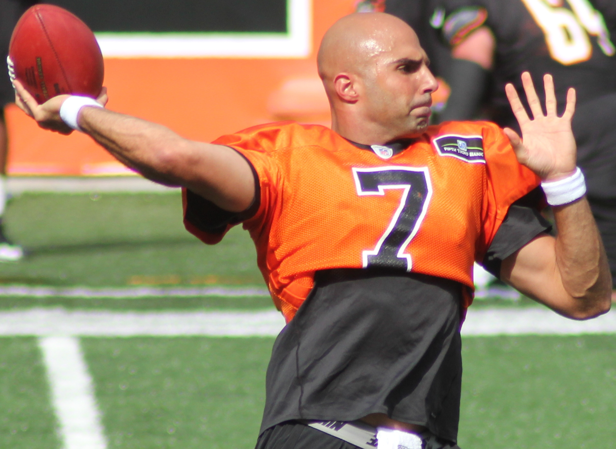 QB Bruce Gradkowski